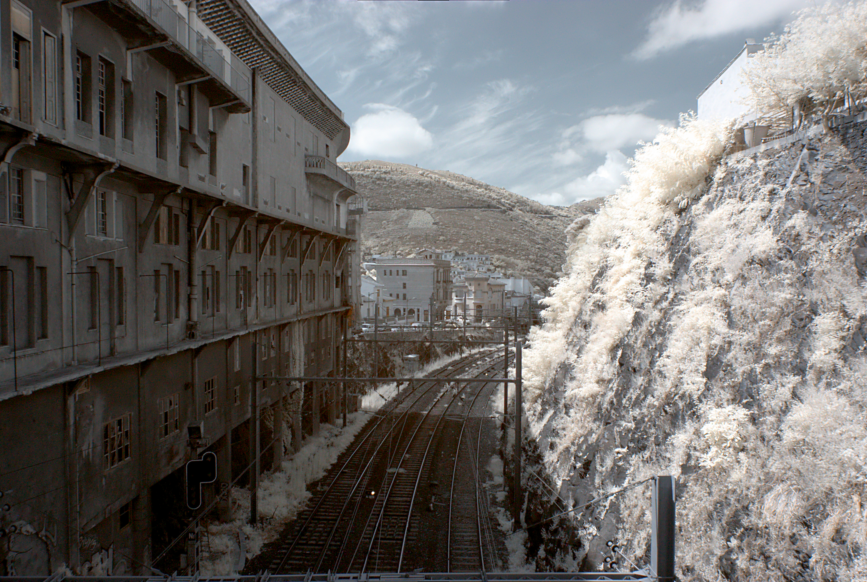 Ligne de chemin de fer, Cerbère (Pyrénées-Orientales, Languedoc-Roussillon, France) photographiée avec un filtre infrarouge 720 nm.